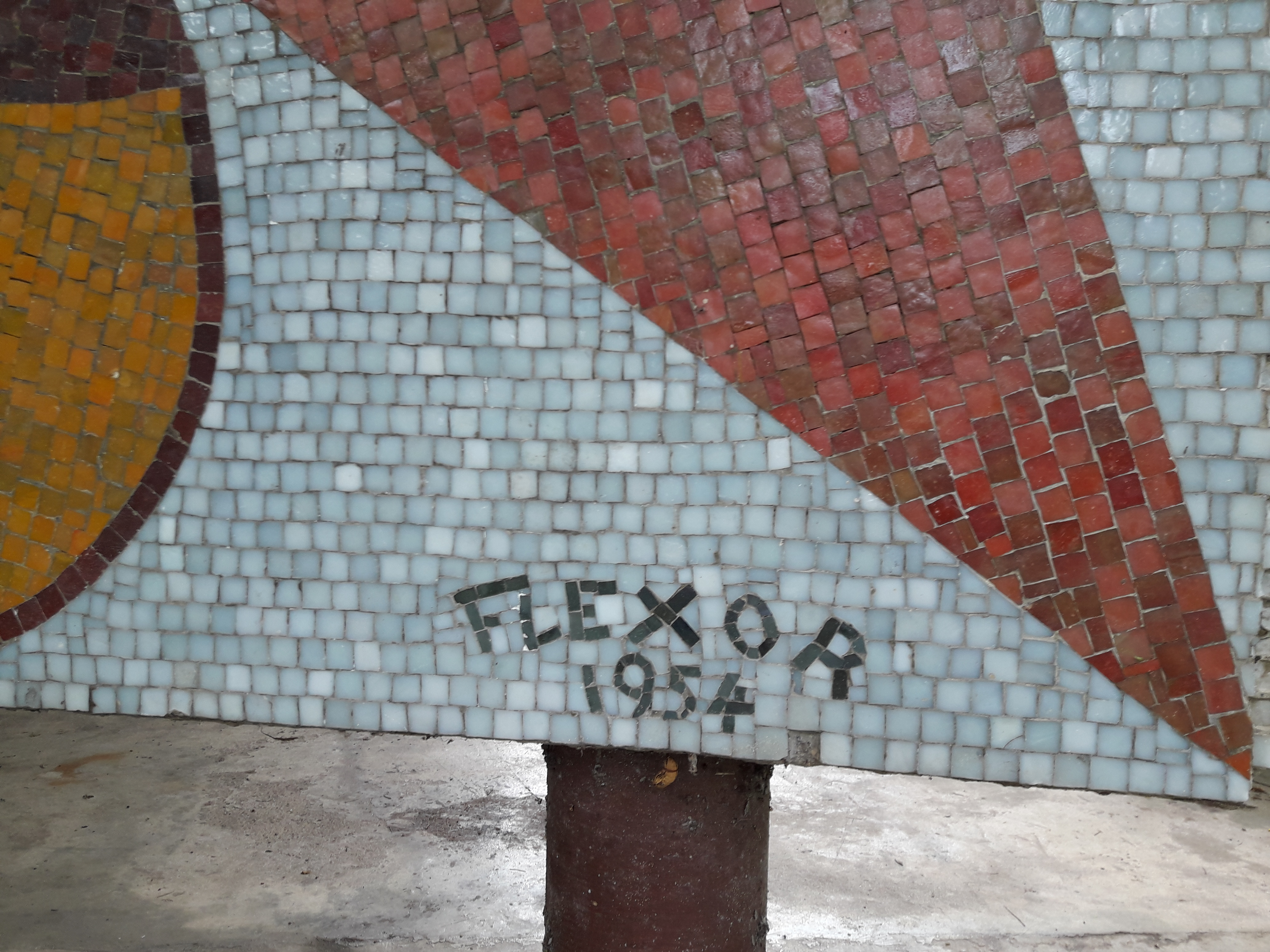 Detalhe do Mural de Samson Flexor no Hospital Municipal São Luís Gonzaga, localizado na Zona Norte de São Paulo (SP), colocando em destaque a assinatura do artista.